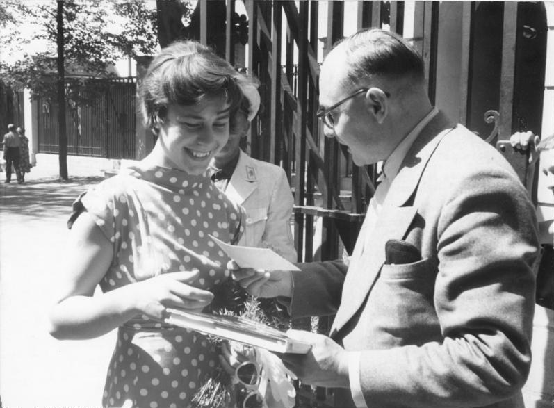 Berliner Tierpark, Dr. Dathe begrüßt 1 Mio Besucher Zentralbild/Quasch 19.7.1956 Der 1.000.000. Besucher des Berliner Tierparks In den Mittagsstunden des 19.7.1956 wurde der 1.000.000. Besucher des Berliner Tierparks in Friedrichsfelde von dem Direktor Dr. Dathe begrüßt. Völlig überrascht nahm Käte Langner aus Berlin-Schönberg den Blumenstrauß , eine Jahresfreikarte sowie ein Buch und ein Bild in Empfang. UBz.: Dr. Dathe überreicht Käte Langner die Jahresfreikarte. Abgebildete Personen: Dathe, Heinrich Prof. Dr.: Direktor des Tierparks Berlin-Friedrichsfelde, DDR